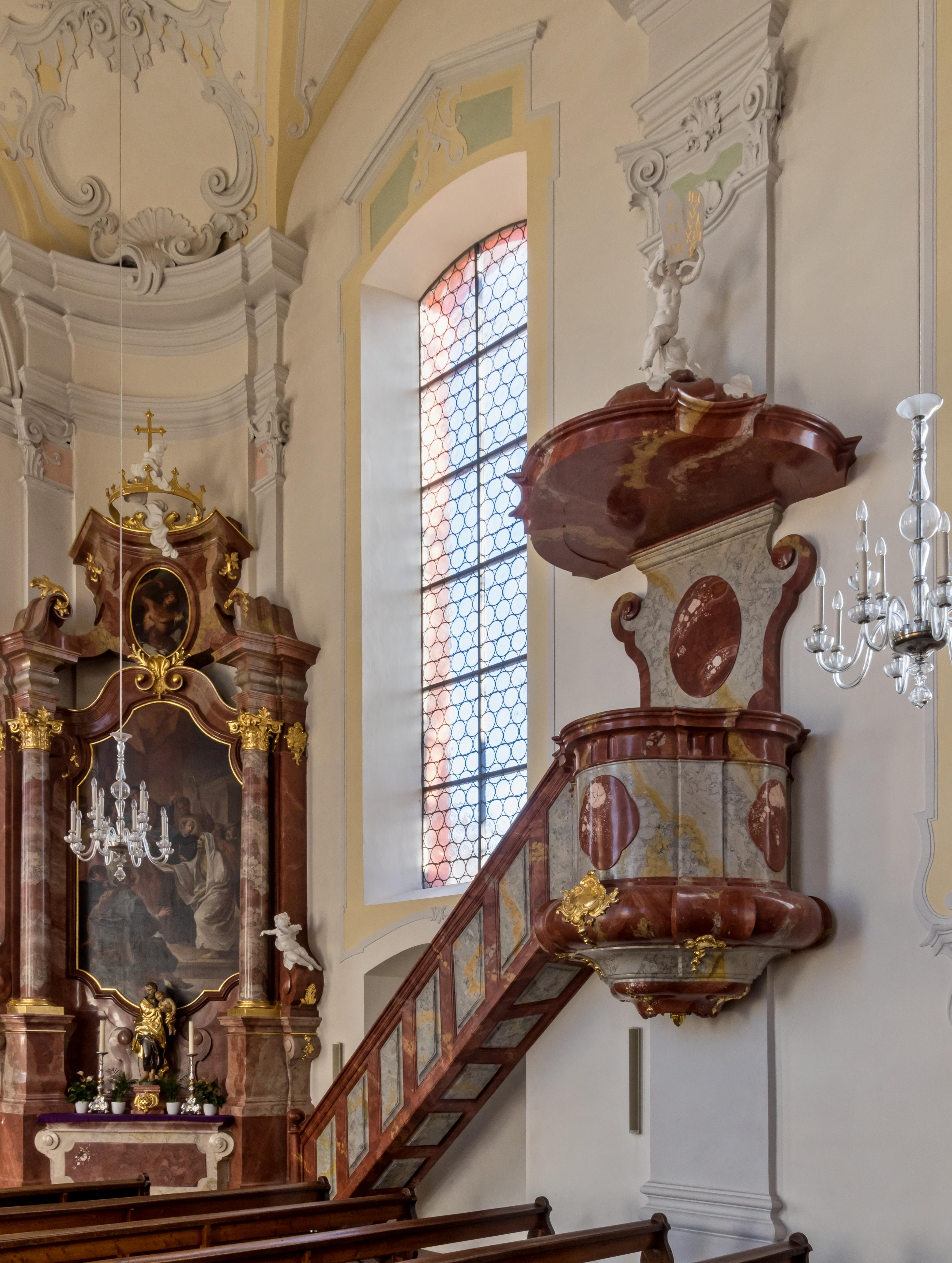 Bilder aus der katholischen Kirche St. Remigius in Merdingen St. Remigius